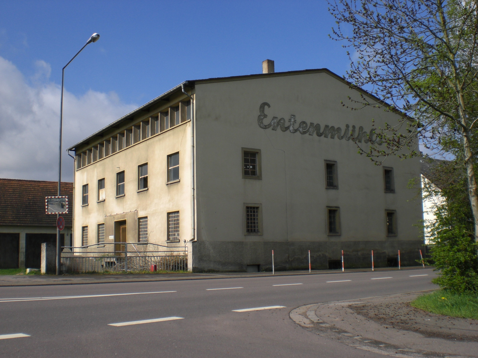 Entenmühle, Homburg (Saar)